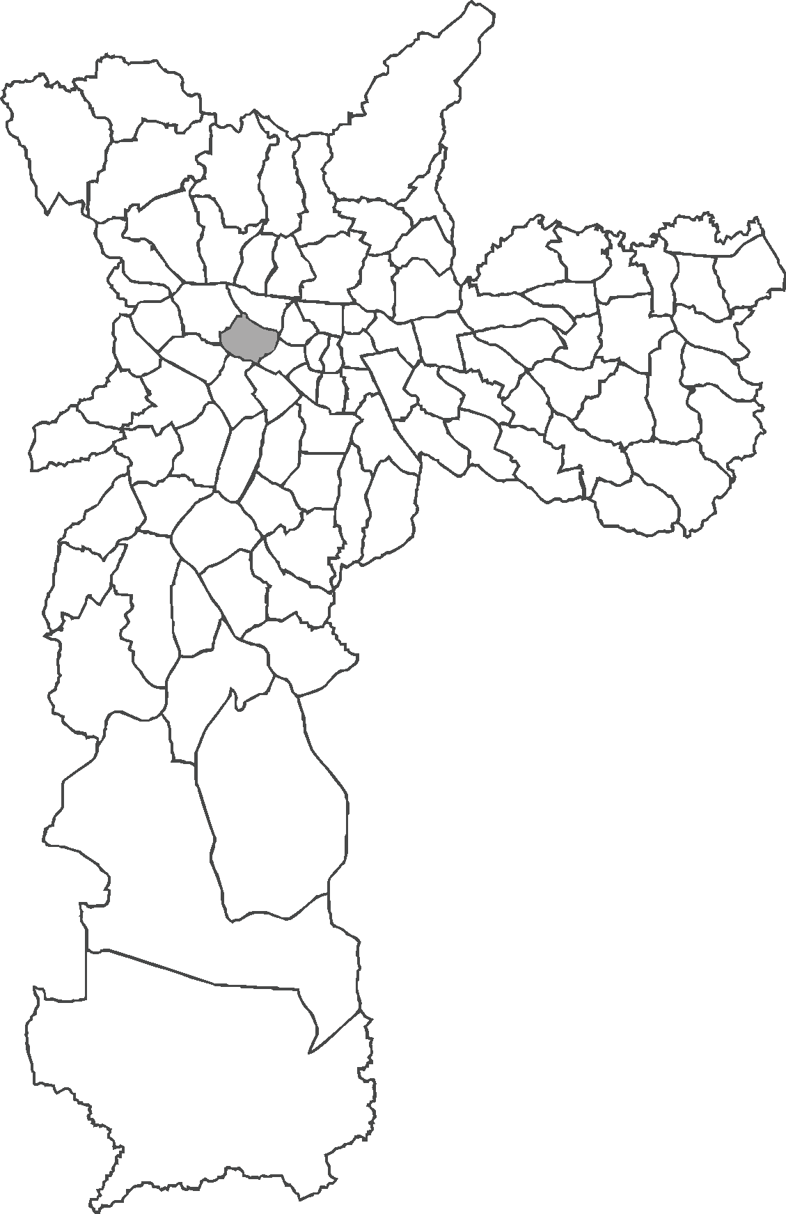 Localização do distrito de Perdizes no município de São Paulo.